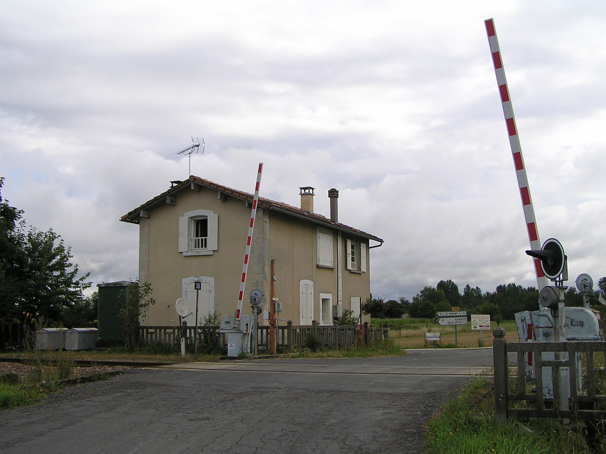 Passage à niveau n° 36 sur la commune d'Angeac-Charente